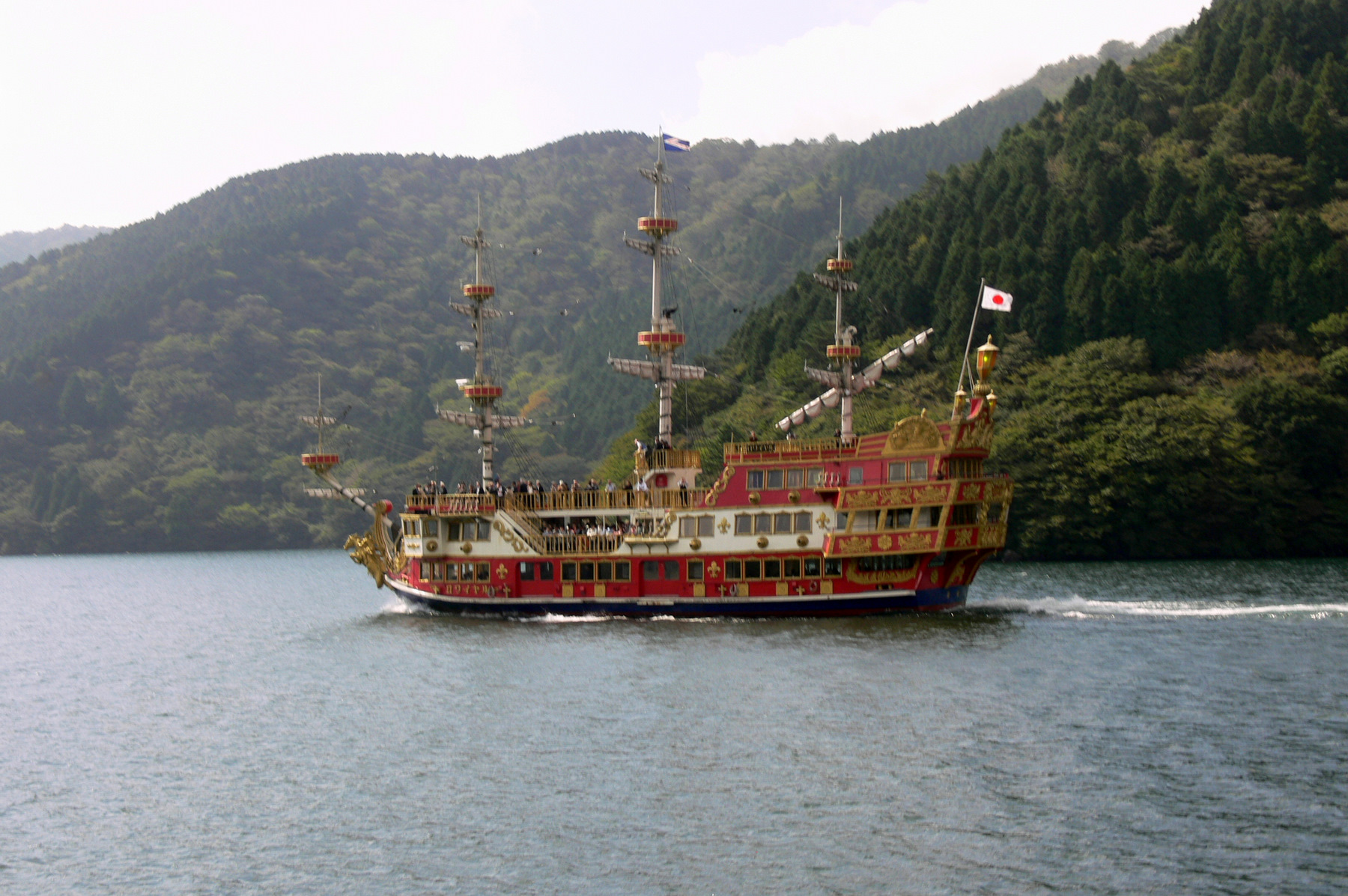 庐之湖海盗船